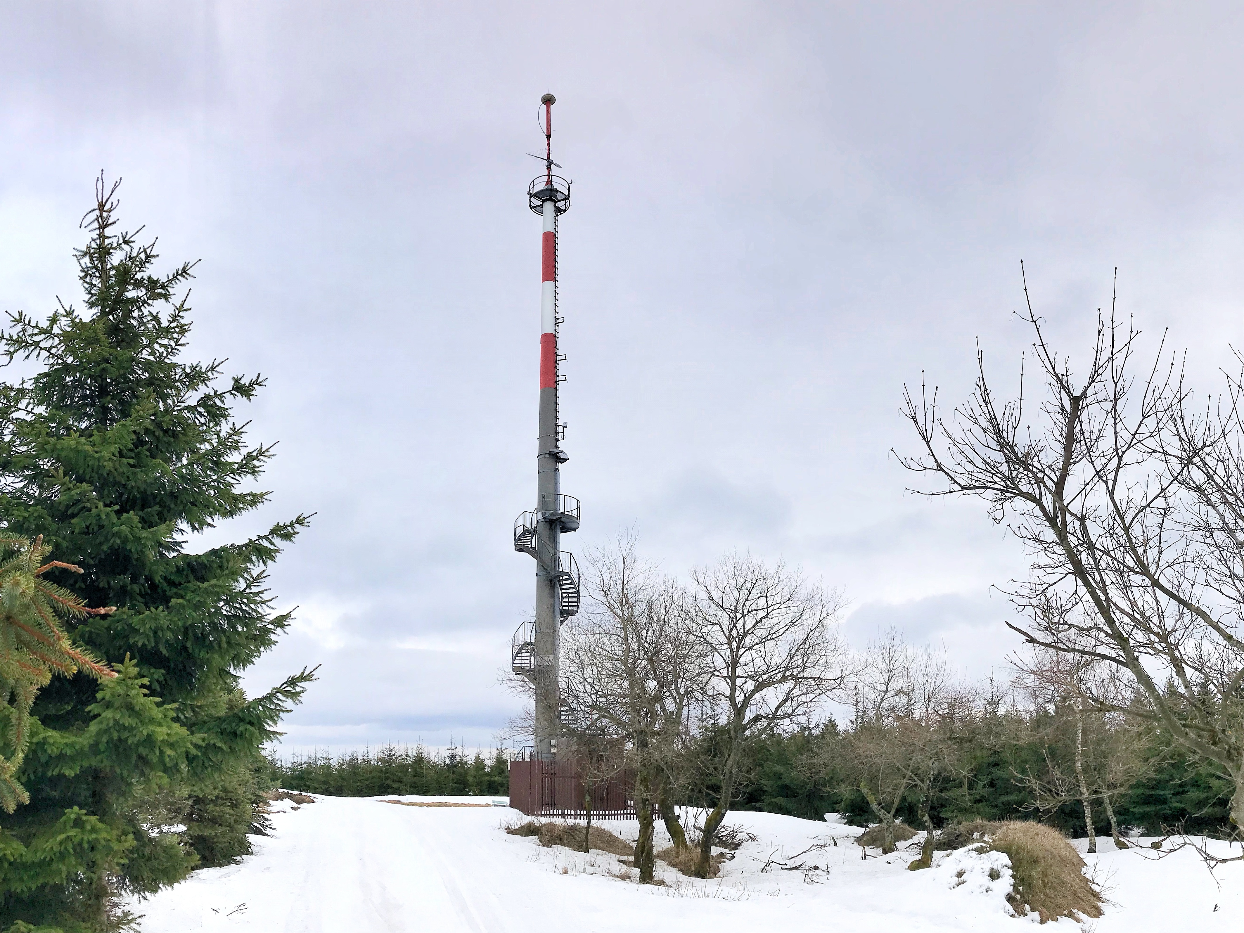 Vrchol hory Vlčí hory (891 m) v Krušných horách